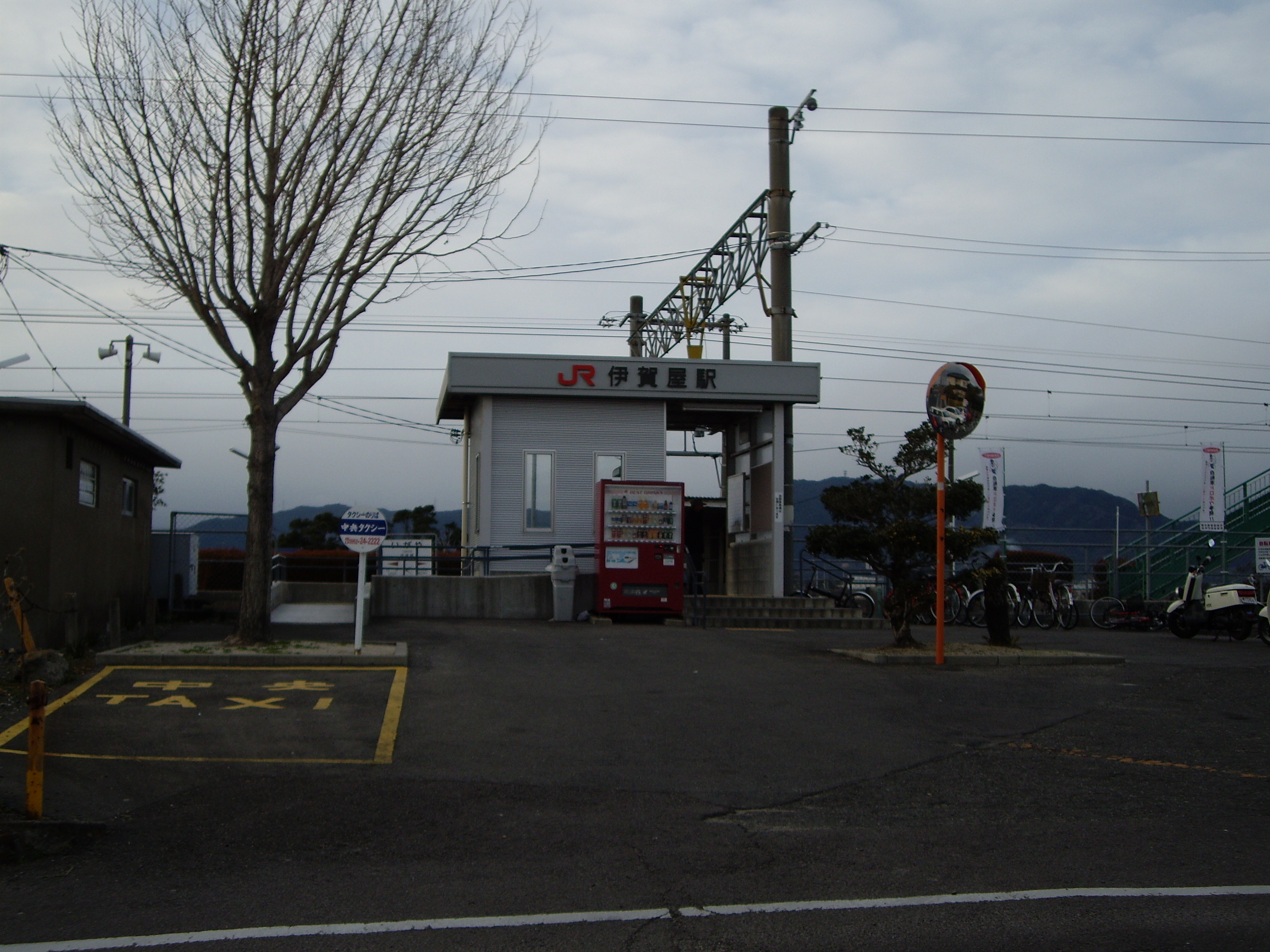 Igaya Station(伊賀屋駅)